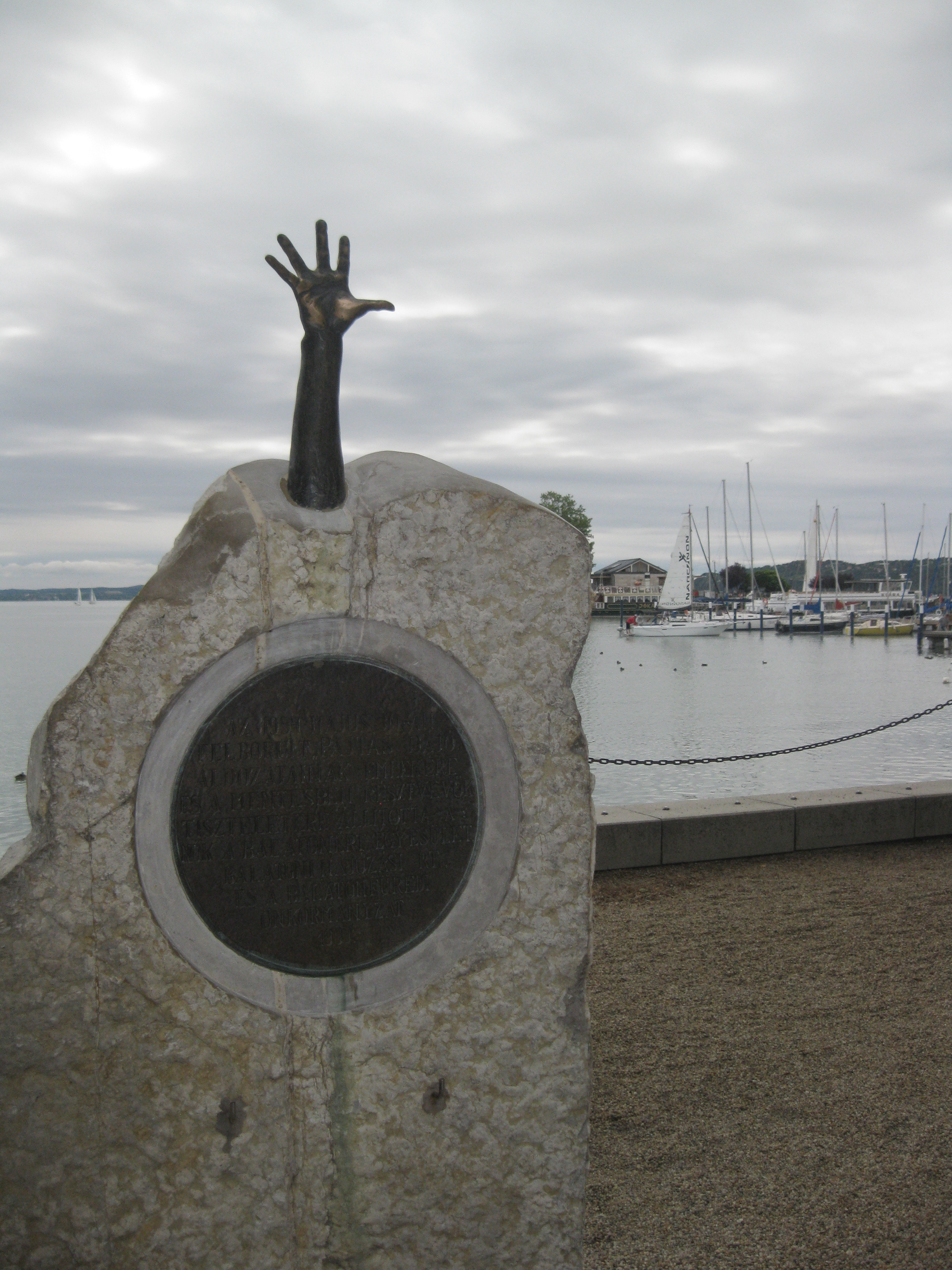 Az 1954-ben felborult Pajtás kishajó áldozatainak emlékére készitett emlék-szobor